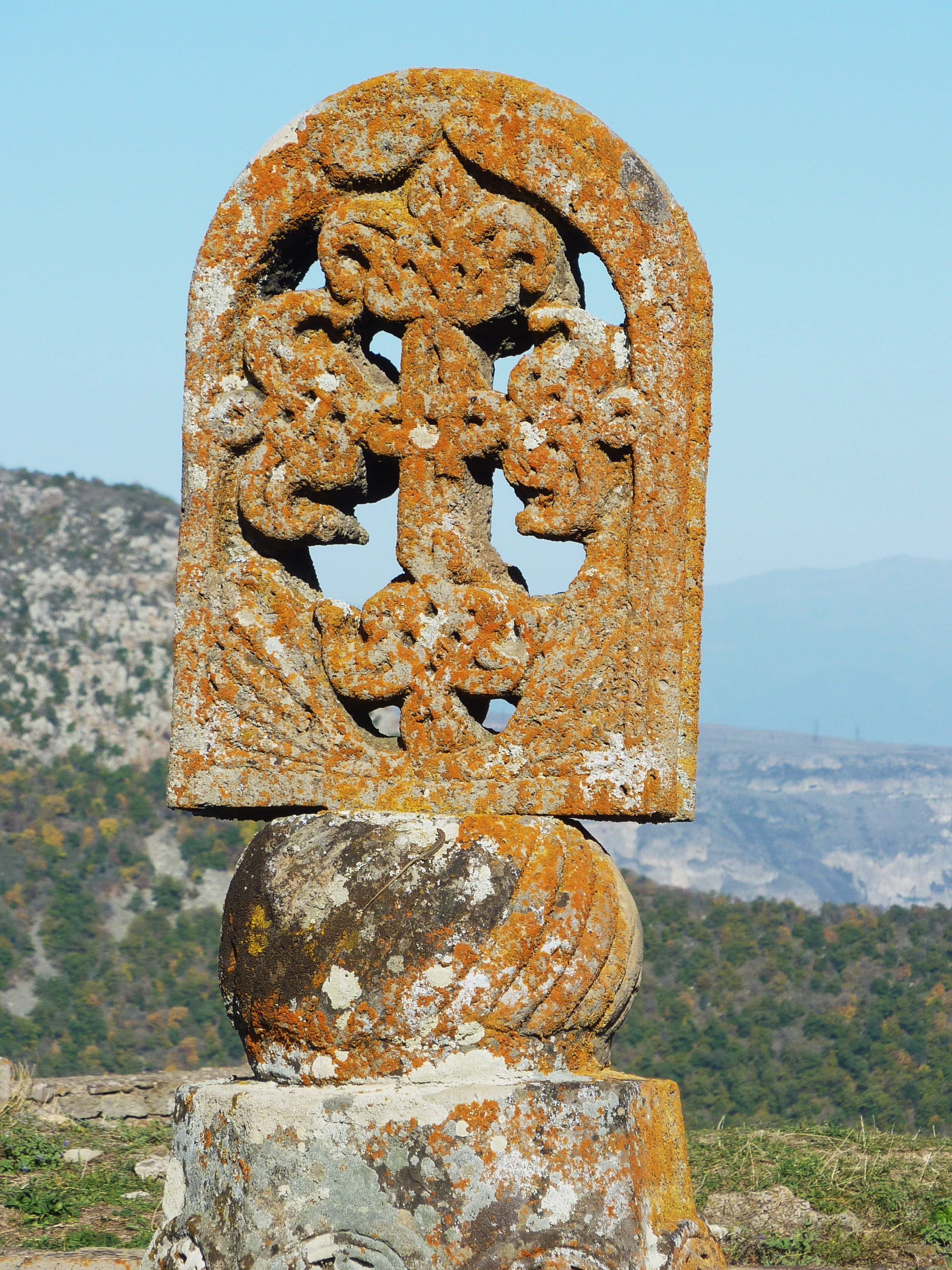 Monastère de Tatév : khatchkar en position instable au sommet de la colonne d'alerte sismique servant d'alerte lors de tremblements de terre 97/9.30